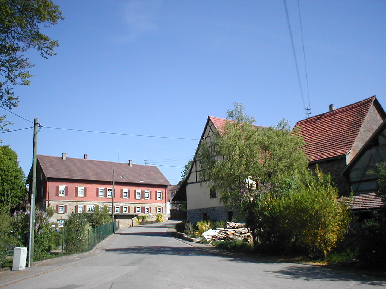 Gutshof in Bockschaft